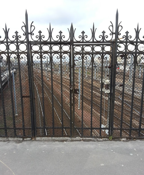 Grille d'accès à l'ancienne gare de Pont-Marcadet (Paris 18e) aujourd'hui disparue sur le pont éponyme, Paris 18e.